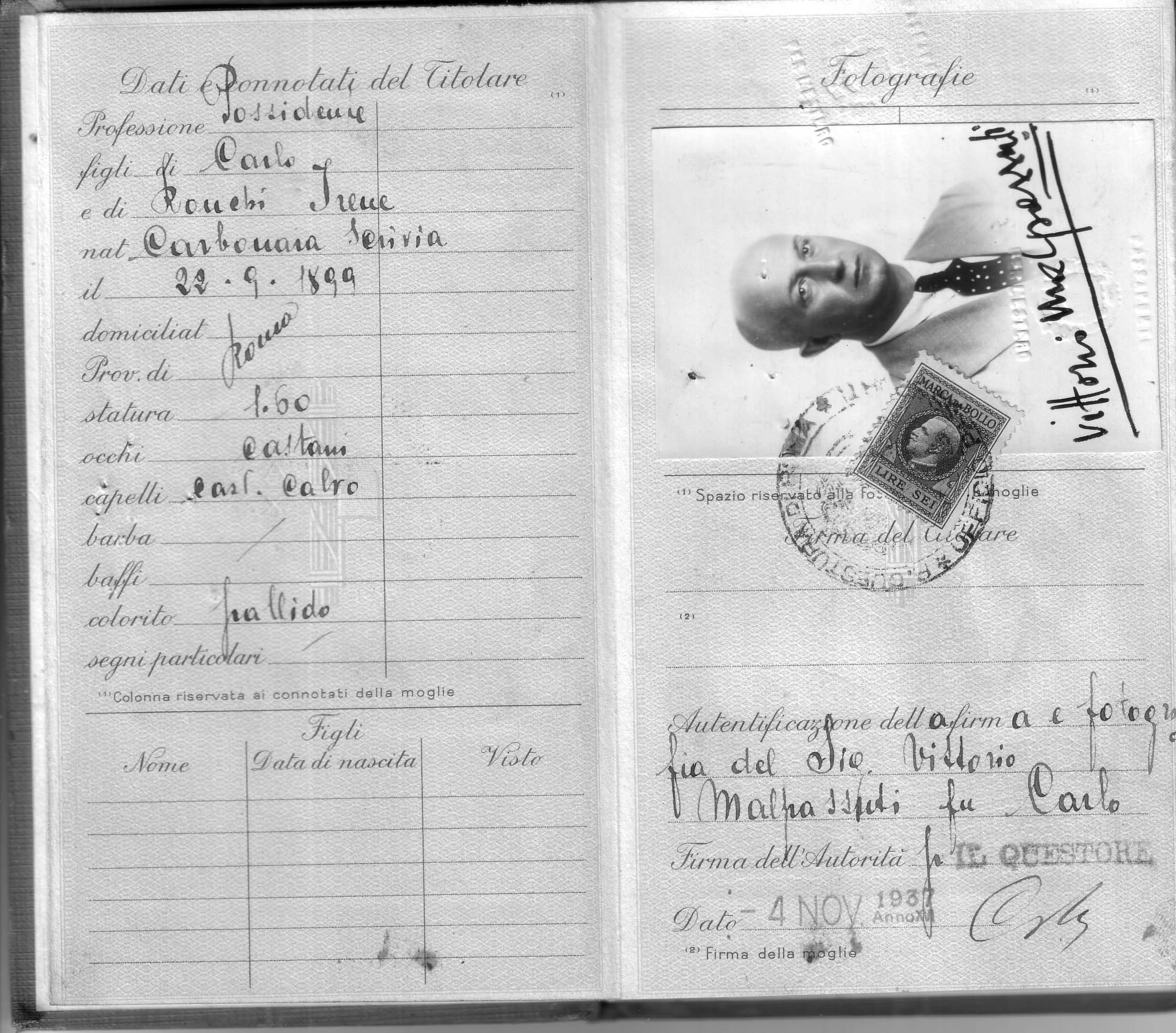 Vittorio Malpassuti - passaporto Fonte: archivio famiglia Malpassuti